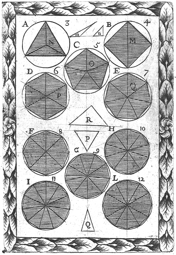 Original image description from the Deutsche Fotothek Geometrie & Dreieck & Viereck & Vieleck & Winkel